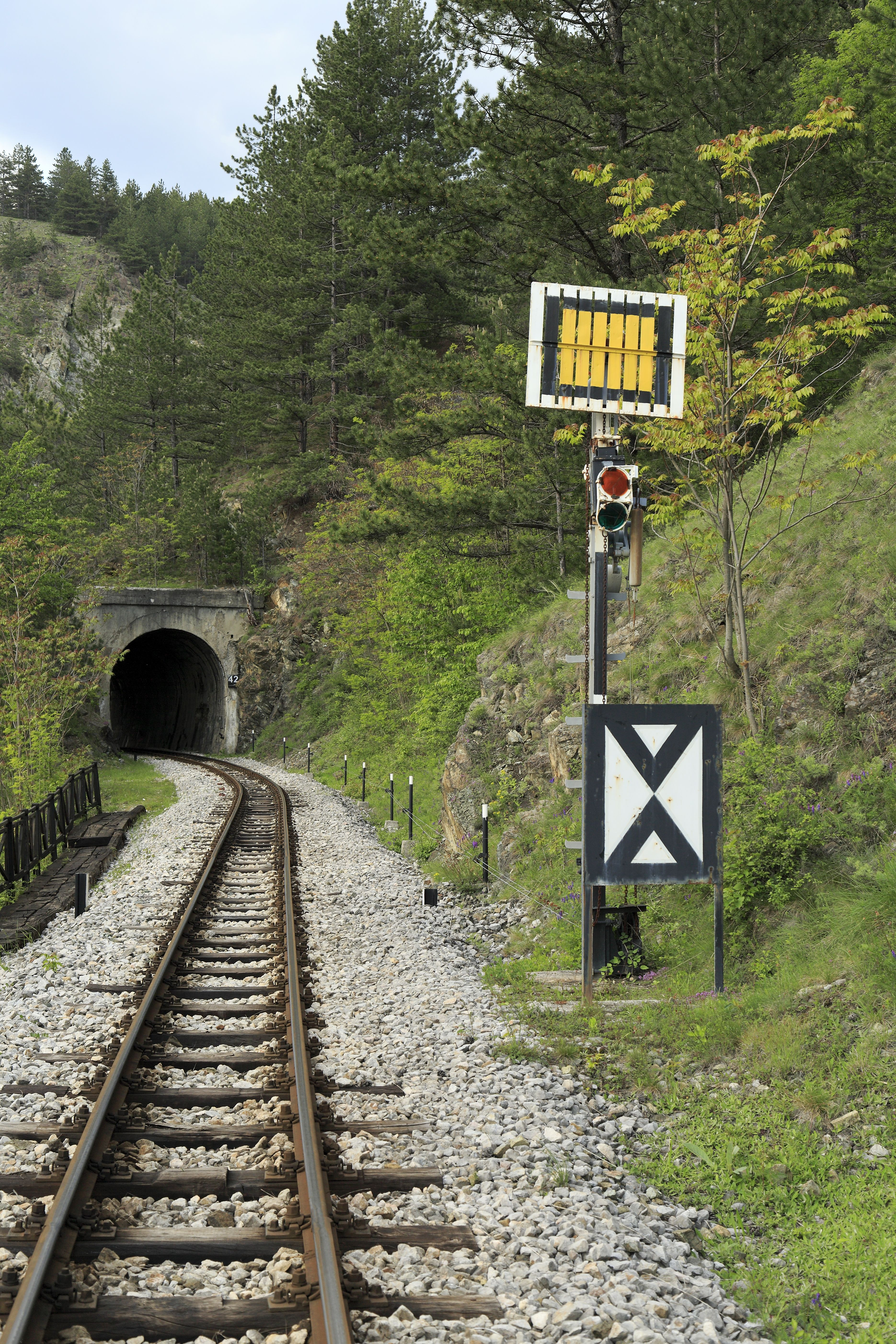 typisch altösterreichische Bauart bis zur Vorsignaltafel, in der Tschechoslowakei sah das genauso aus. Der Tunnel im Hintergrund ist der kurze Sporntunnel 42.